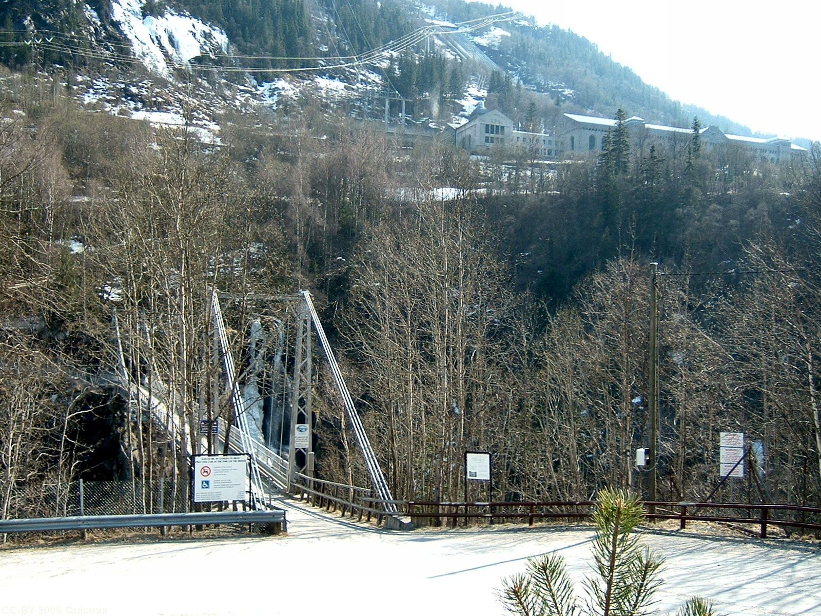 Het Vermork complex bij Rjukan (Noorwegen) - eigen foto, mei 2006